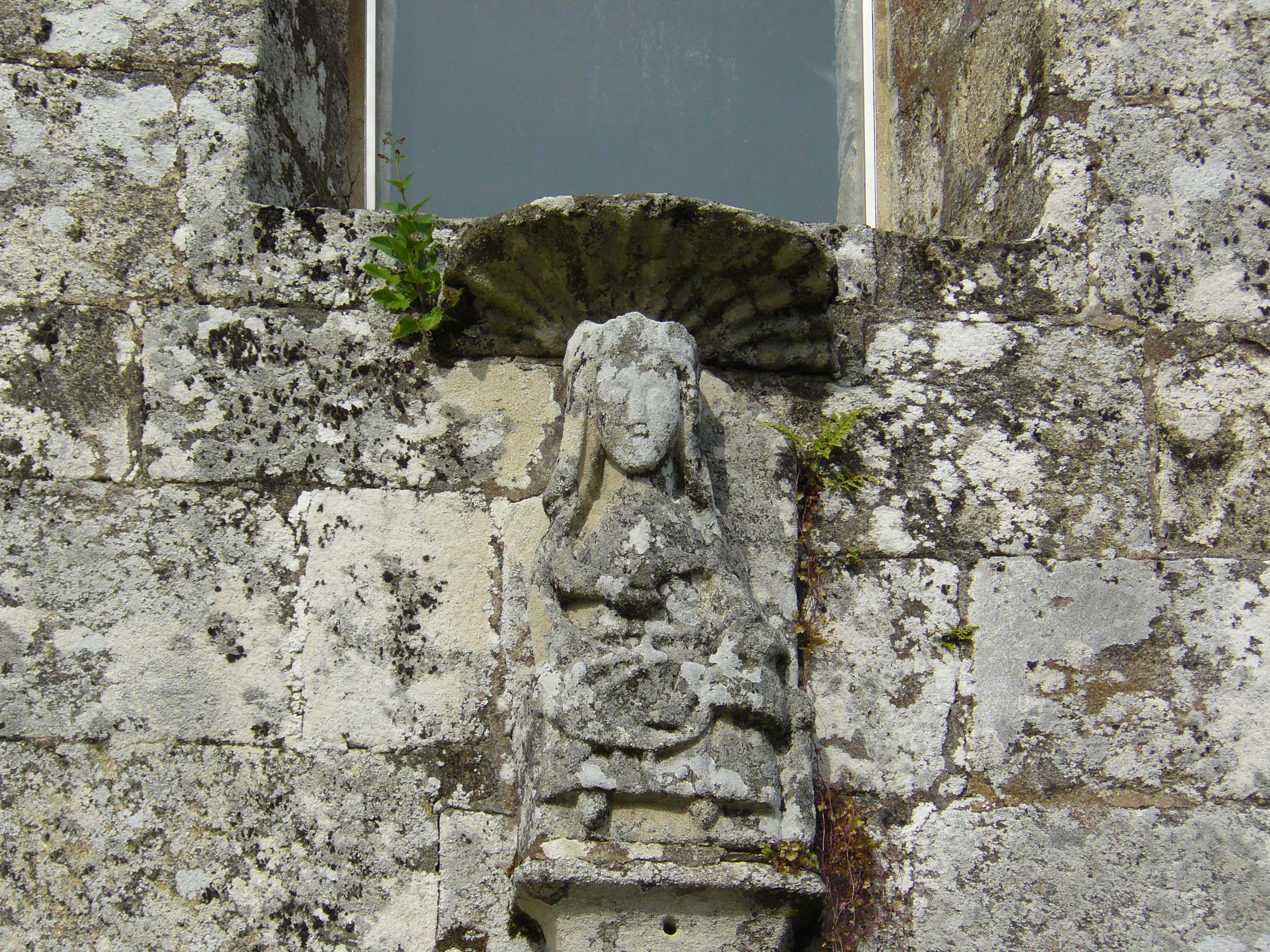 Virxe da portada-Mosteiro de Aciveiro